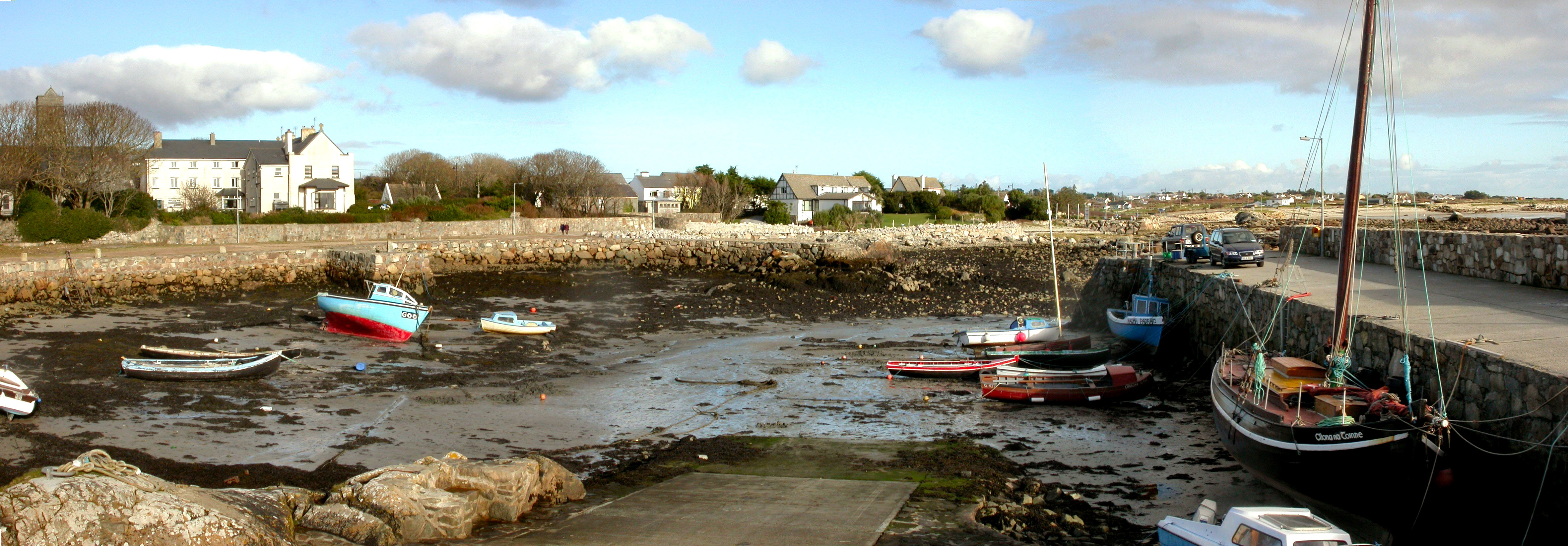 Cuan An Spidéil, Co. na Gaillimhe